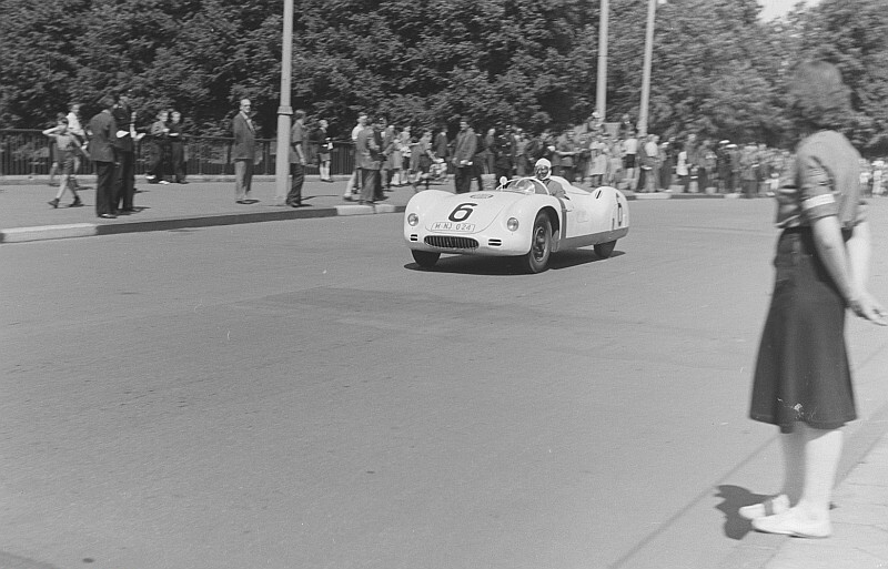 Original image description from the Deutsche FotothekStadtparkrennen "Rund um das Scheibenholz"